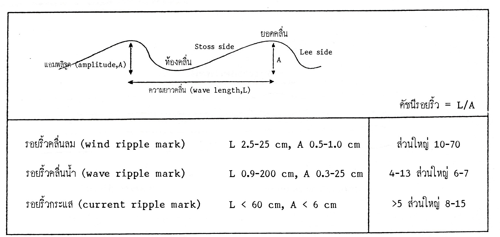 การพิจารณาความยาวคลื่นและแอมพลิจูดเพื่อจัดประเภทของรอยริ้วคลื่นที่เกิดจากการกระทำของลม หรือน้ำ หรือกระแส